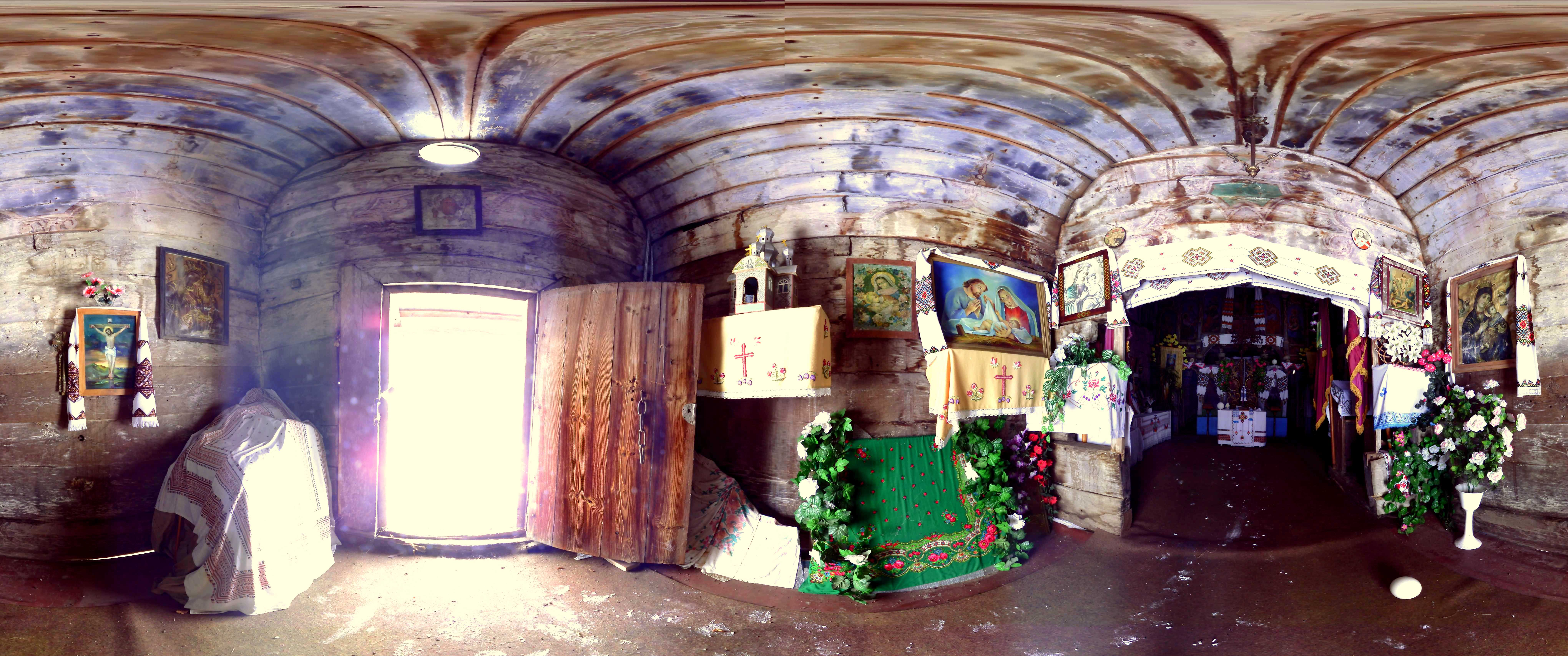 Церква Різдва Богородиці (дер.), Стиборівка